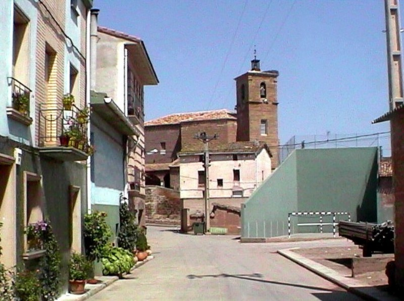 azofra - church Nuestra Señora de los Ángeles